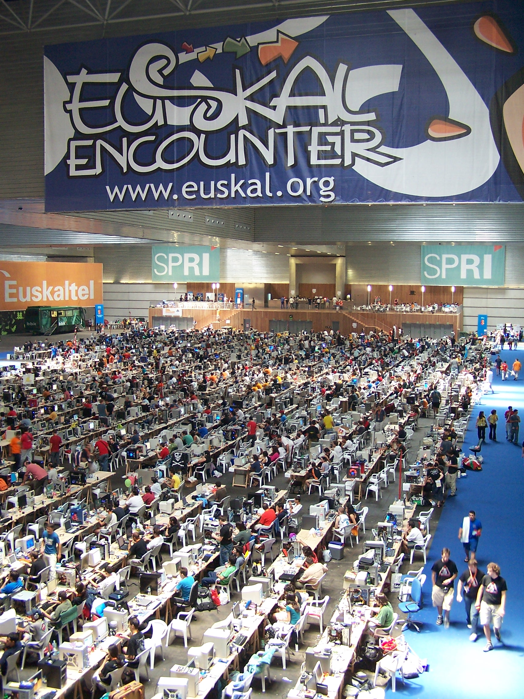 vista de participantes en la euskal 13